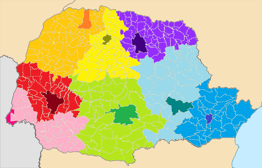 Cobertura das emissoras da RPC, rede de televisão afiliada à Rede Globo no Paraná.